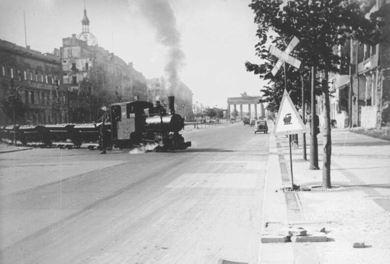 ADN-ZB/Donath Berlin 1946 Auch in der Straße Unter den Linden wurden sogenannte Trümmerbahnen eingesetzt, die den Schutt zerstörter Häuser abfahren. Im Hintergrund das Brandenburger Tor.